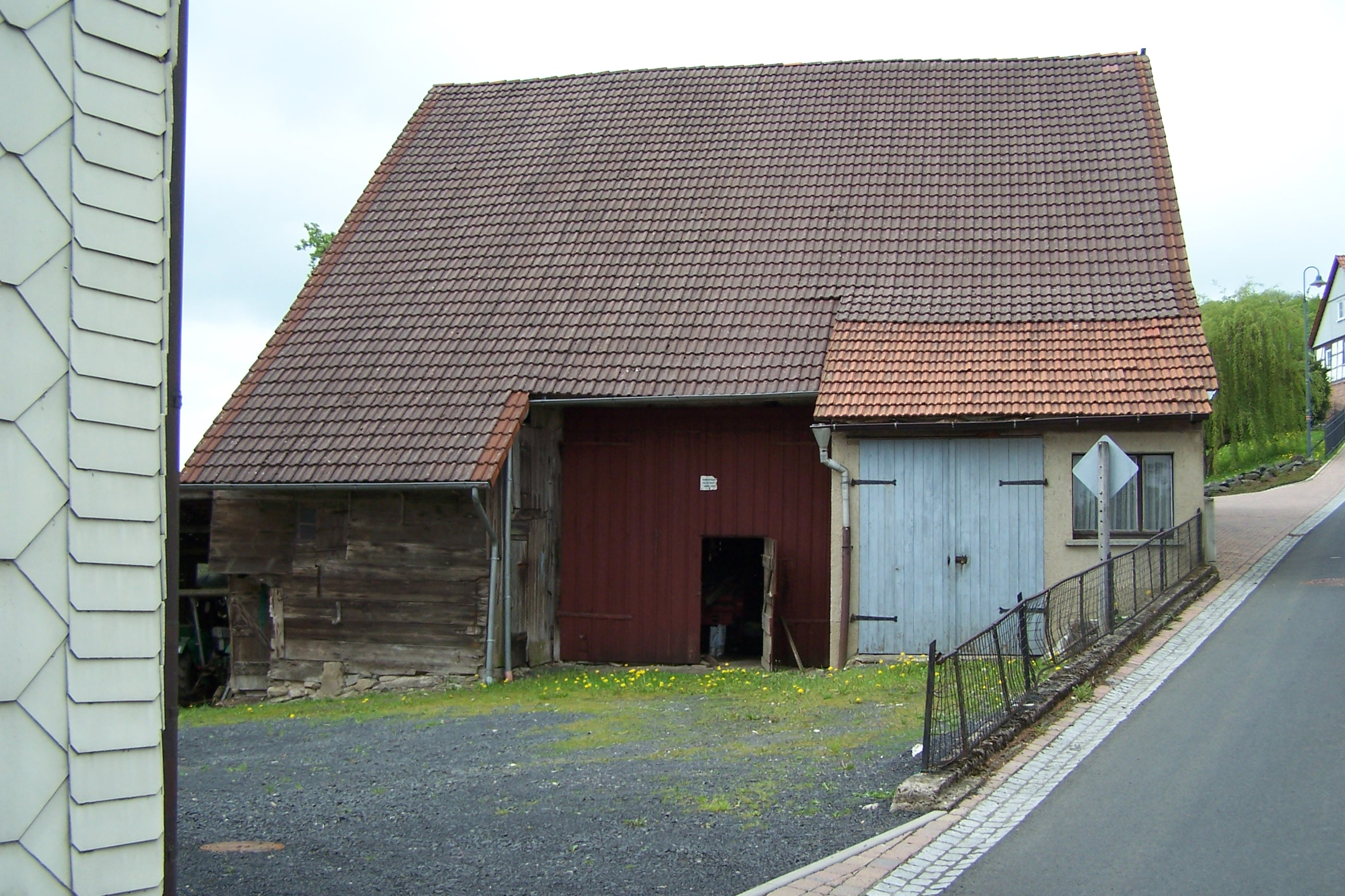 Scheune am Ortsrand von Föhlritz.